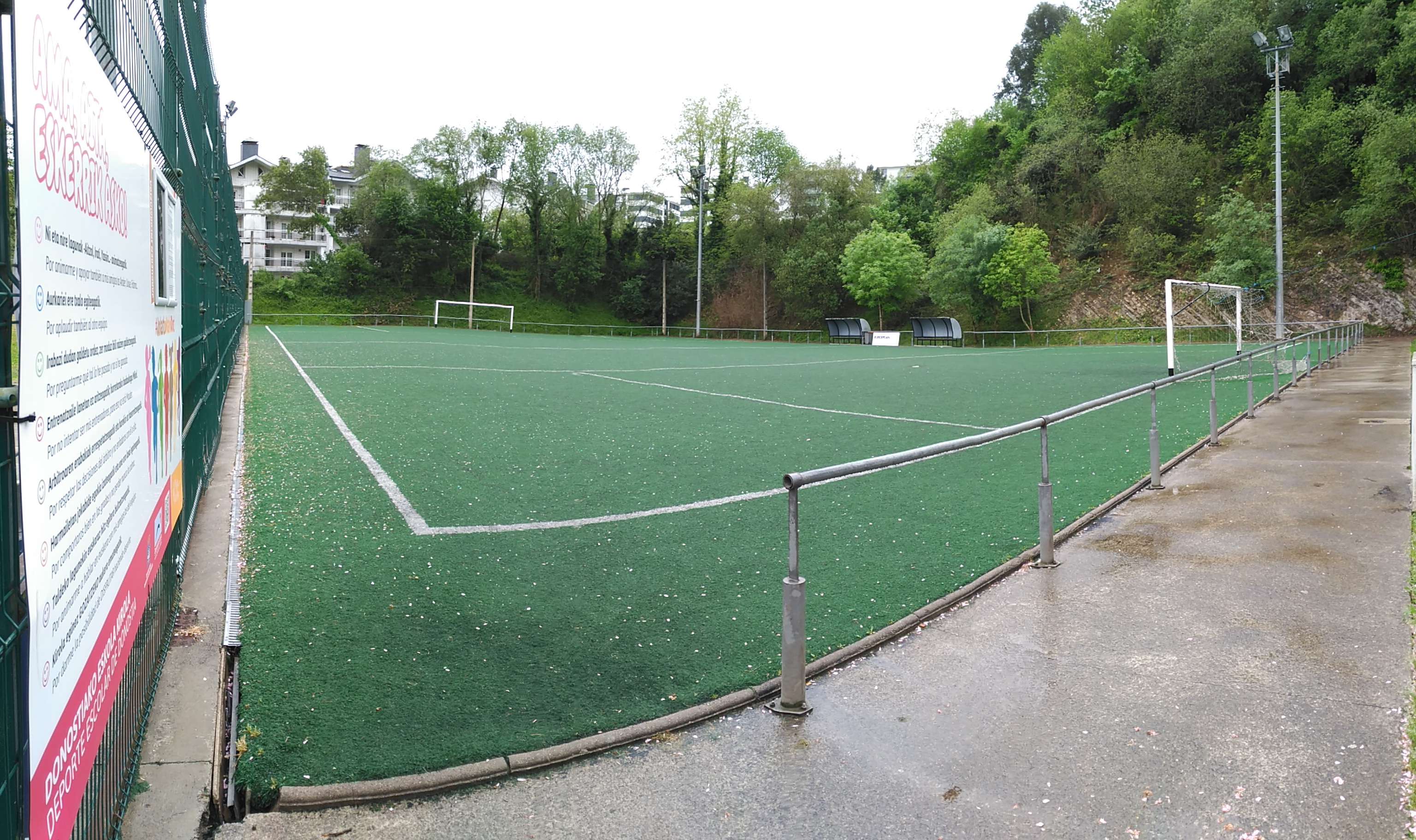 Berio futbol zelaia (futbol 7)